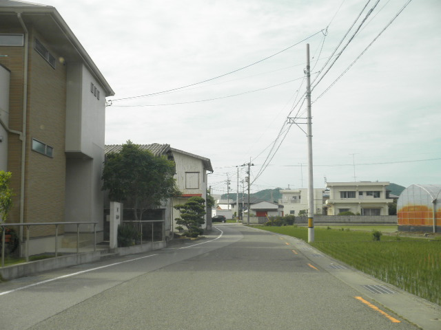 徳島県小松島市芝生町宮ノ後 徳島県道136号宮倉徳島線